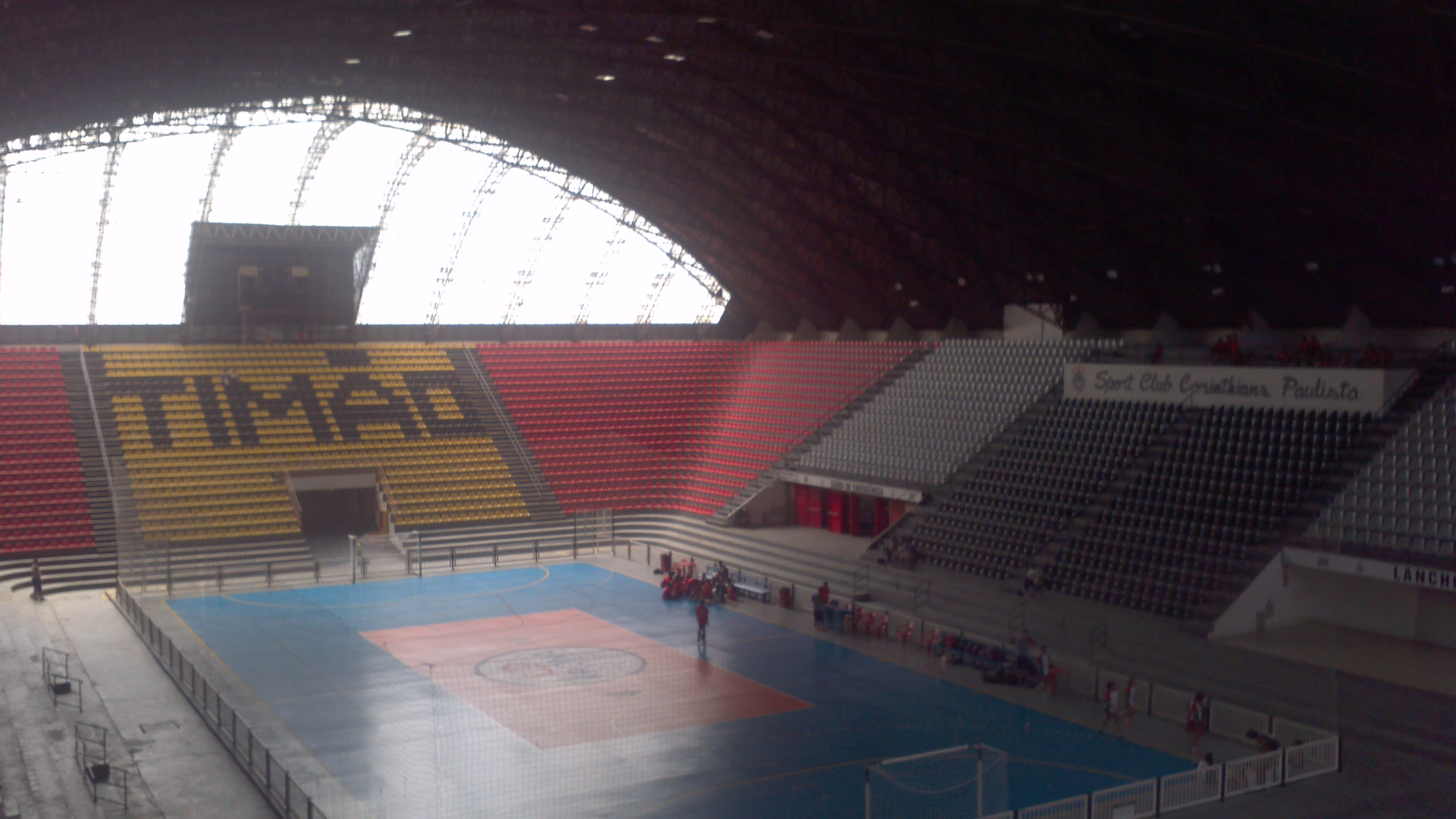 Ginásio Principal, localizado no Parque São Jorge